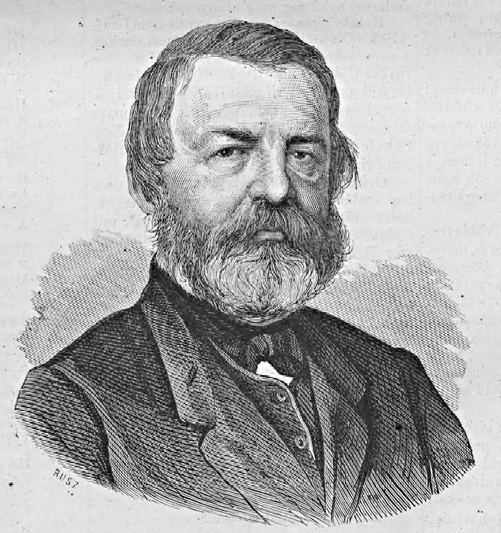 Nyáry Pál (1805–1871) politikus. Rusz Károly metszete (Vasárnapi Ujság, 1871, április 30.)